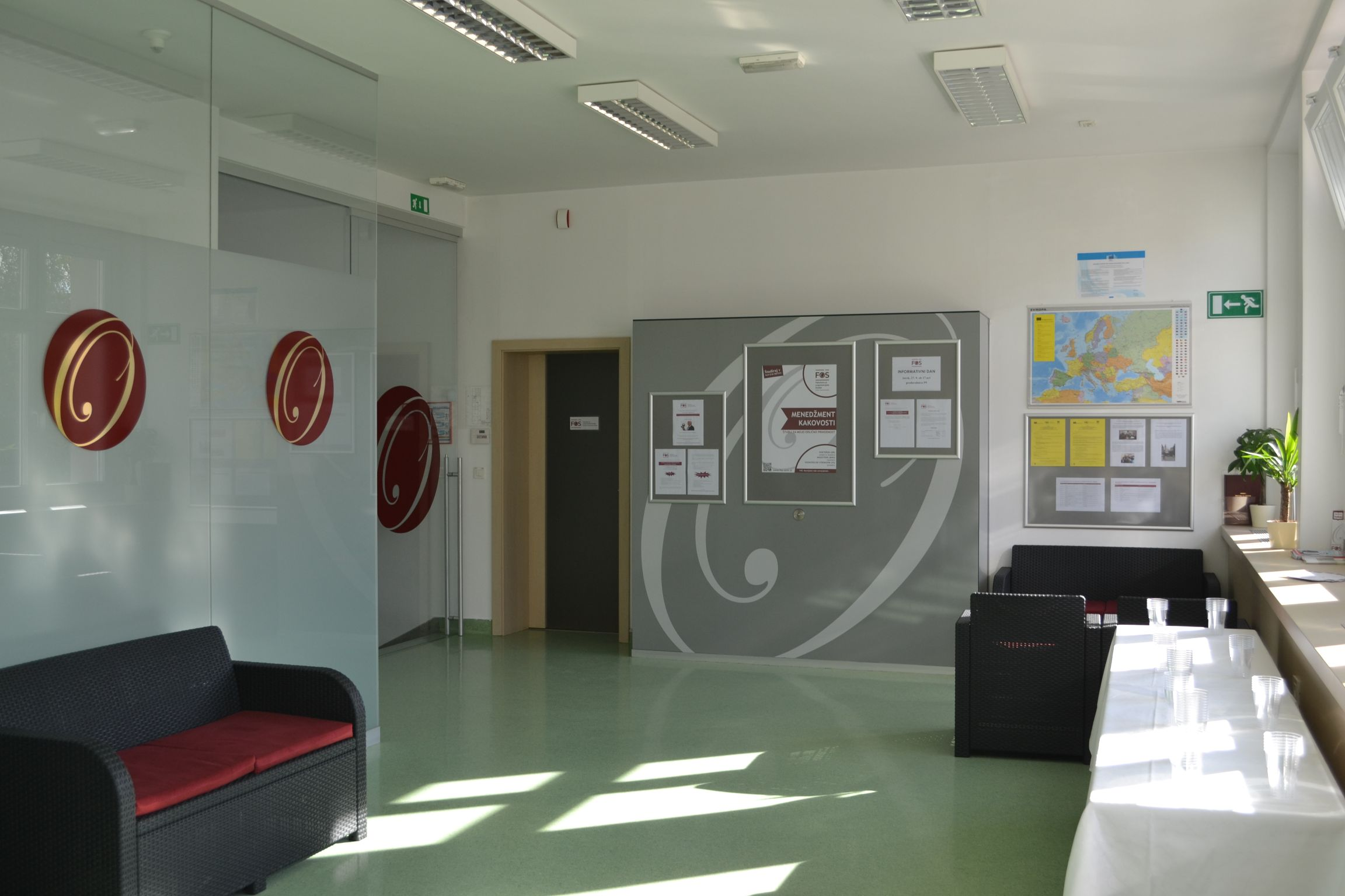 Vhodna avla FOŠ